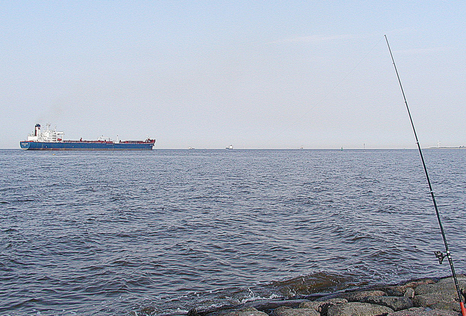 Dicht am Ufer fahren die Schiffe vorbei